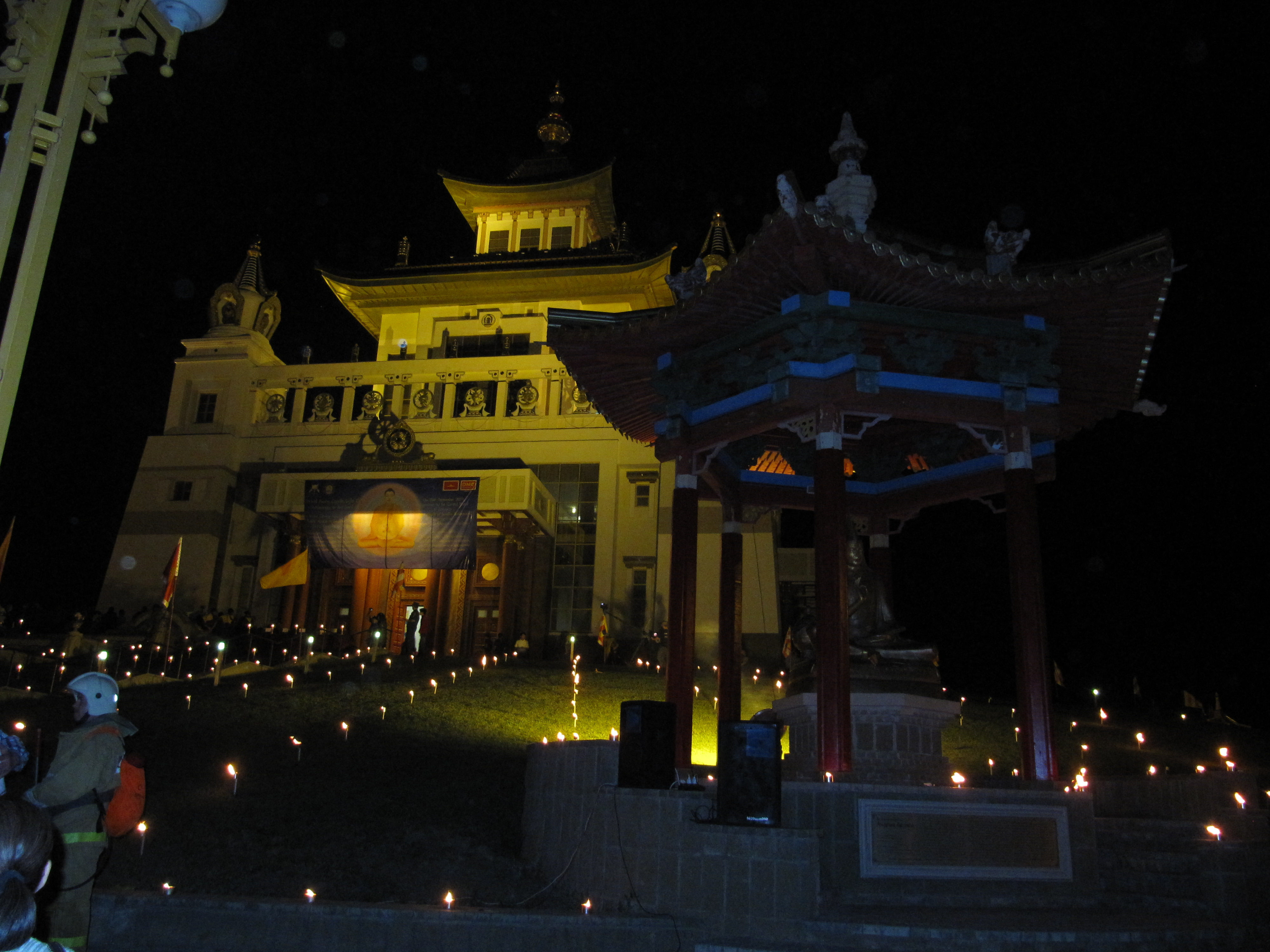 Хурул ночью, Элиста, Калмыкия